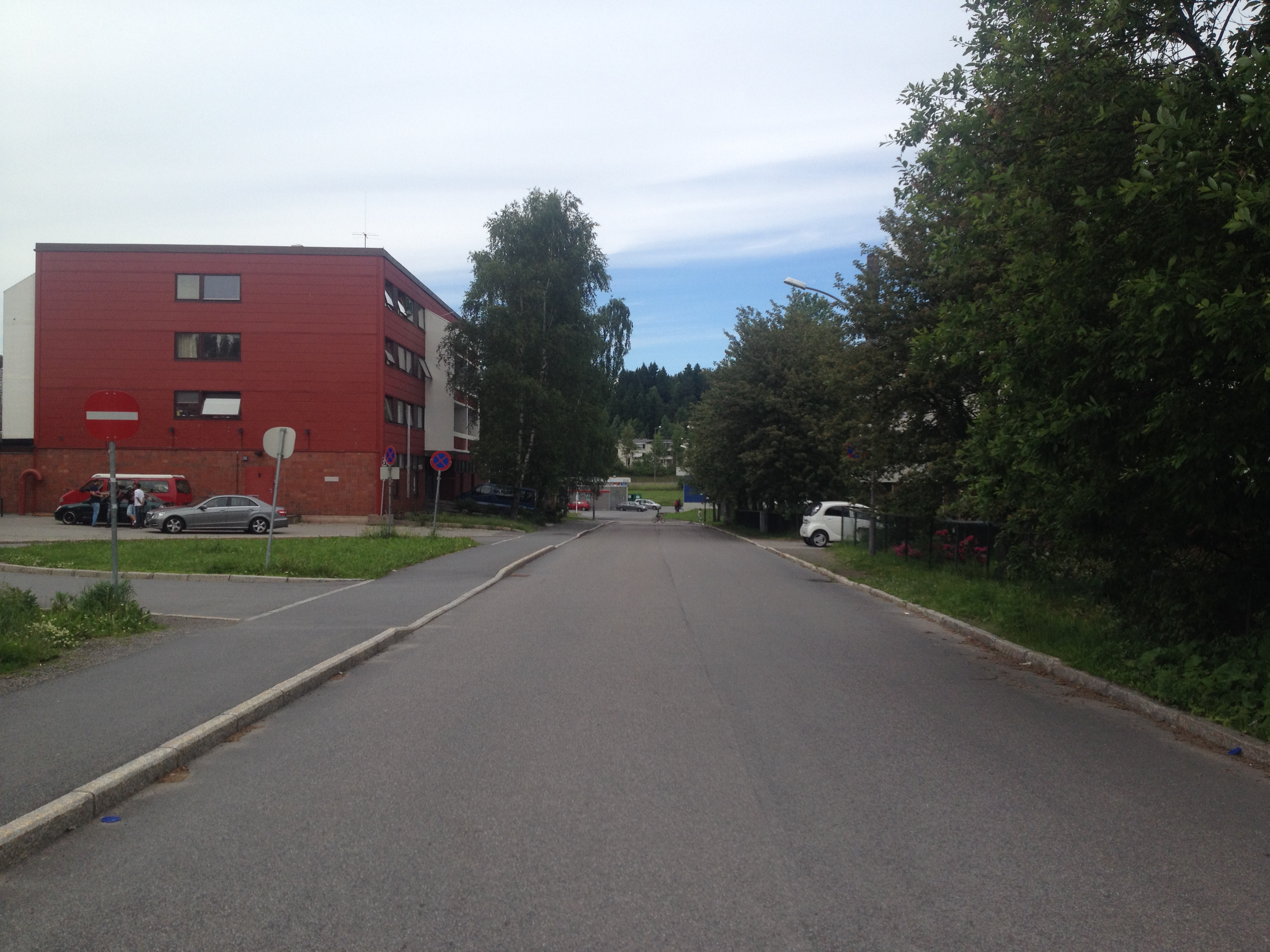 Ole Brumms vei i Oslo